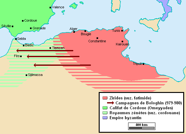 Le territoire ziride entre l'établissement de la Dynastie et la scission des Hammadides